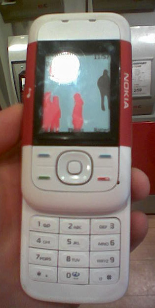 Photo d'un nokia 5200